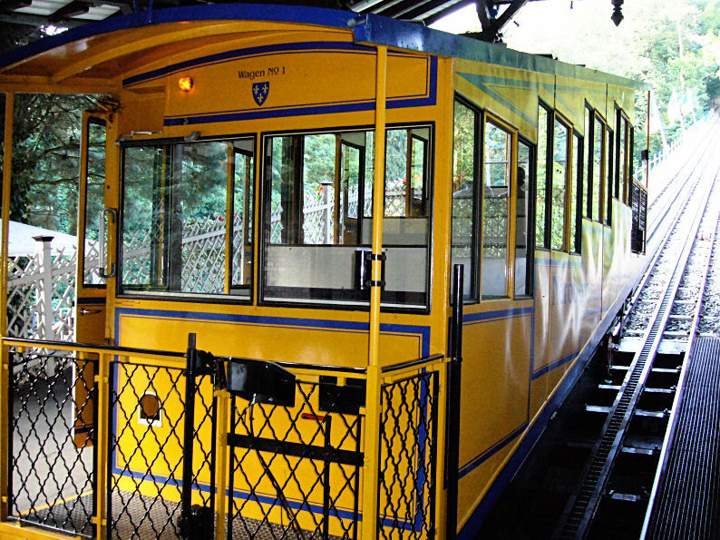 The Nerobergbahn in Wiesbaden. Photo: Laurenz Bobke, Wiesbaden.